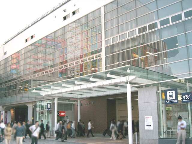 秋葉原駅